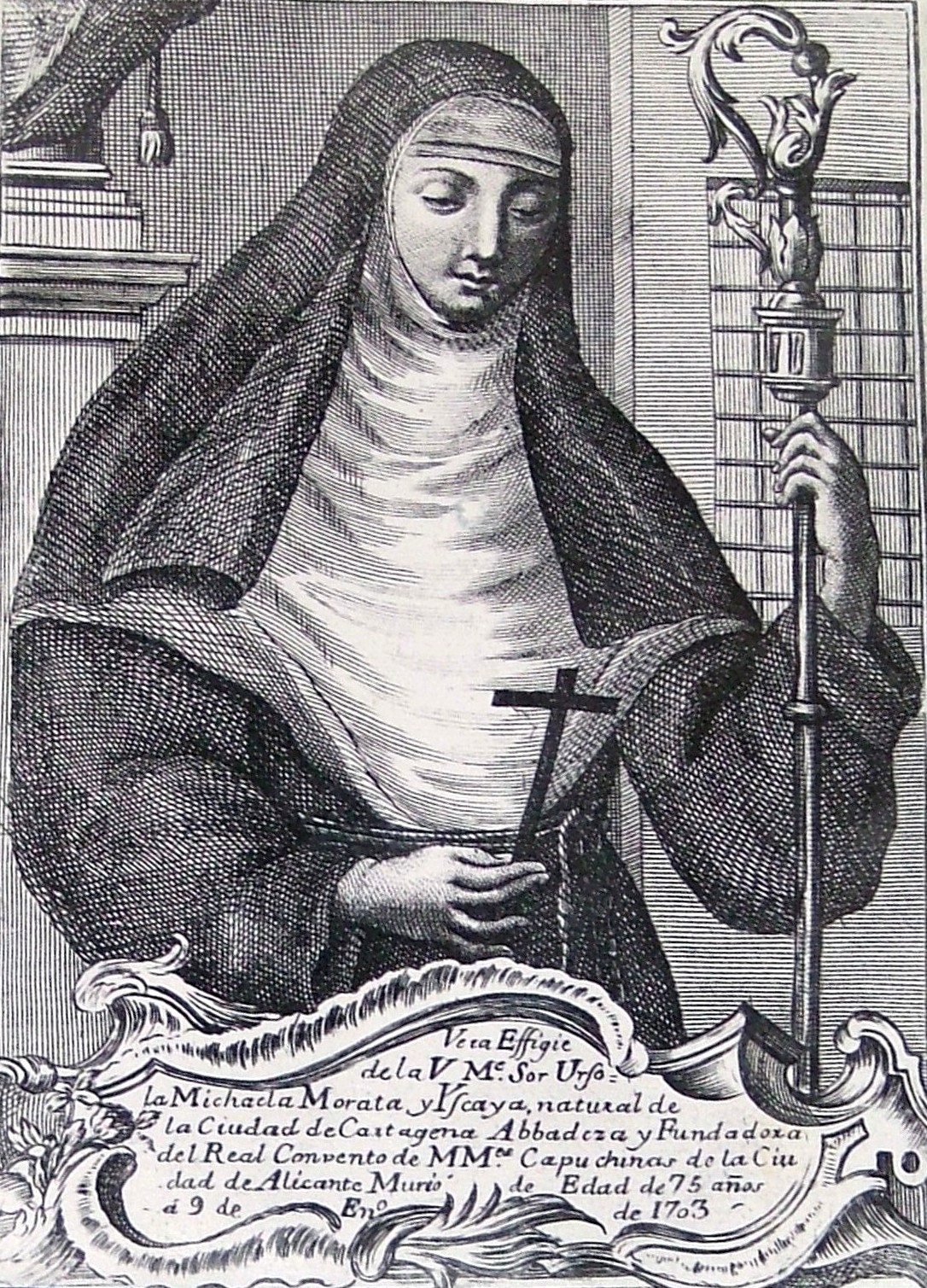 Vera Efigie de Sor Úrsula Micaela Morata